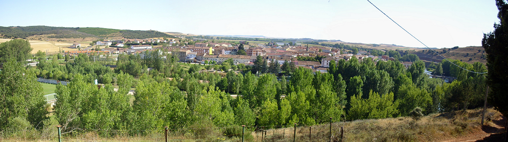 Panorámica de Alar del Rey por la tarde, desde la zona conocida como el Portillo, camino que une el pueblo con Nogales de Pisuerga a través del monte. Cámara utilizada: BenQ DC C640